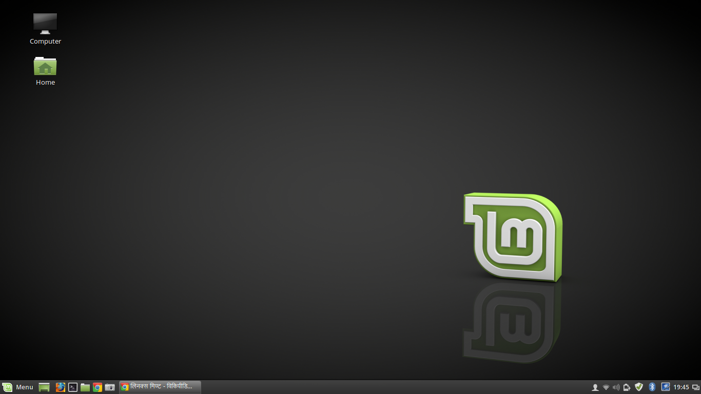 लिनक्स मिंट साराह डेस्कटॉप स्क्रीनशॉट